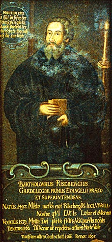 Zeitgenössische Darstellung des evangelischen Theologen Bartholomaeus Rieseberg (verstorben 1566)